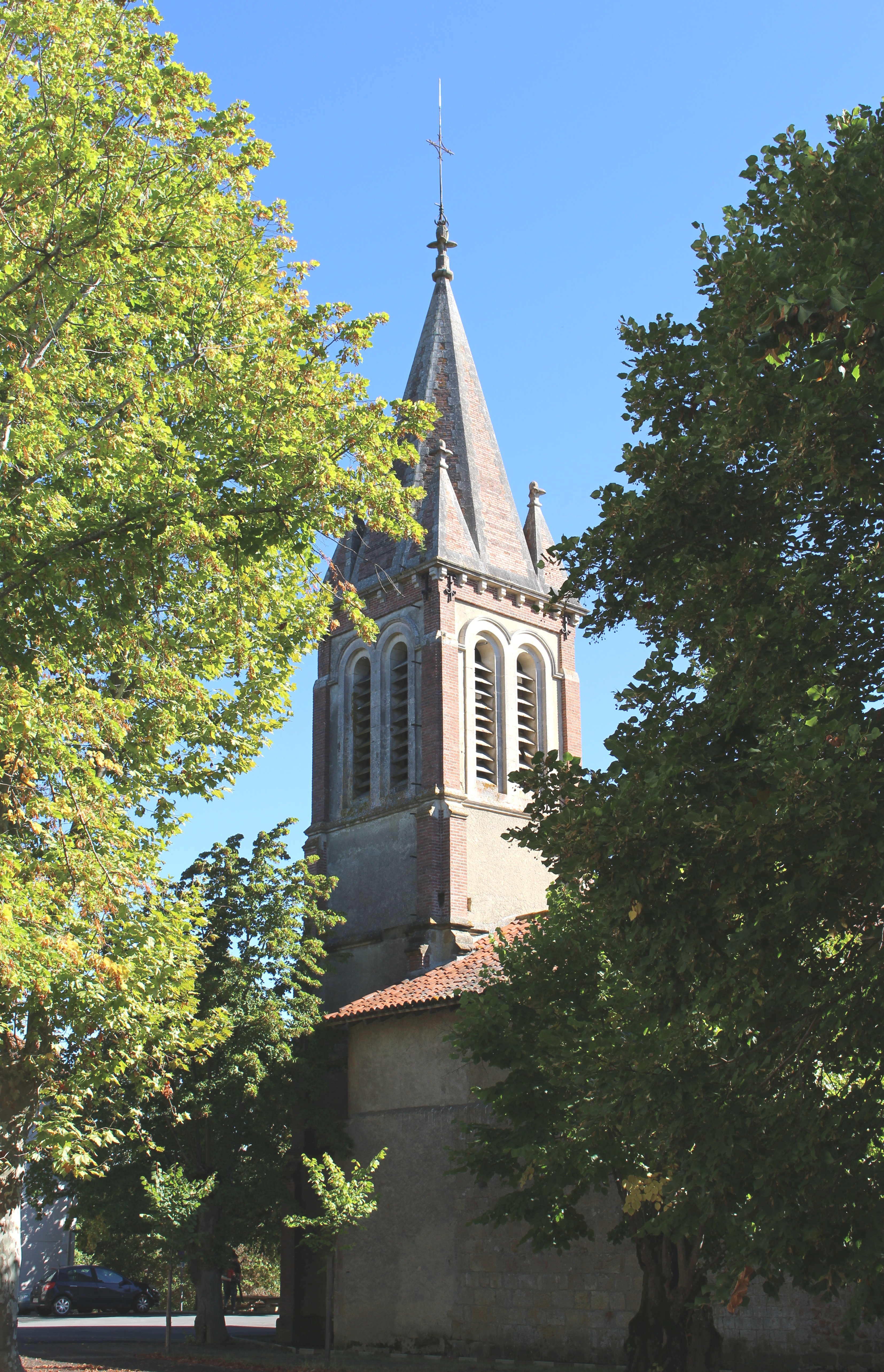 Église Saint-Jacques de Sauveterre (Hautes-Pyrénées)